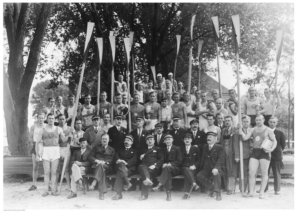 Fotografia grupowa wioślarzy z członkami Zarządu Towarzystwa Wioślarskiego. Rok 1934.